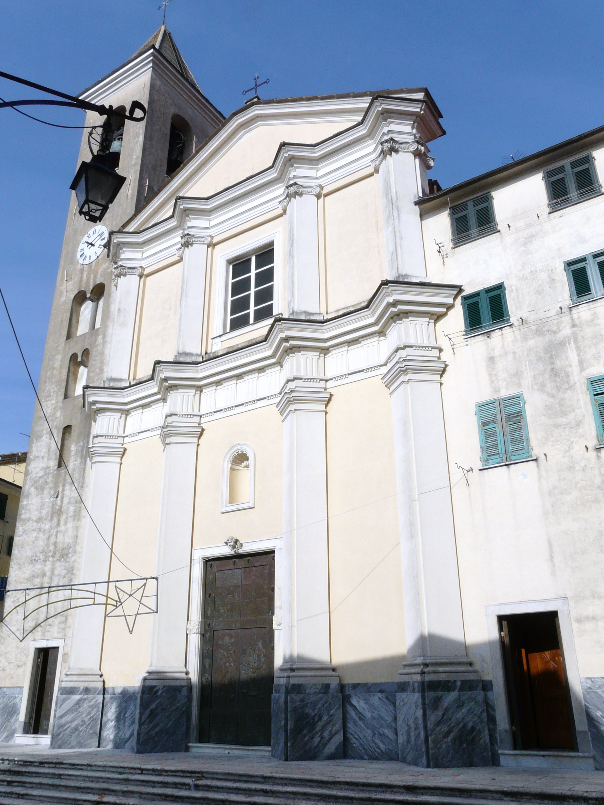 Chiesa parrocchiale di Santa Maria Assunta, Bolano, Liguria, Italia